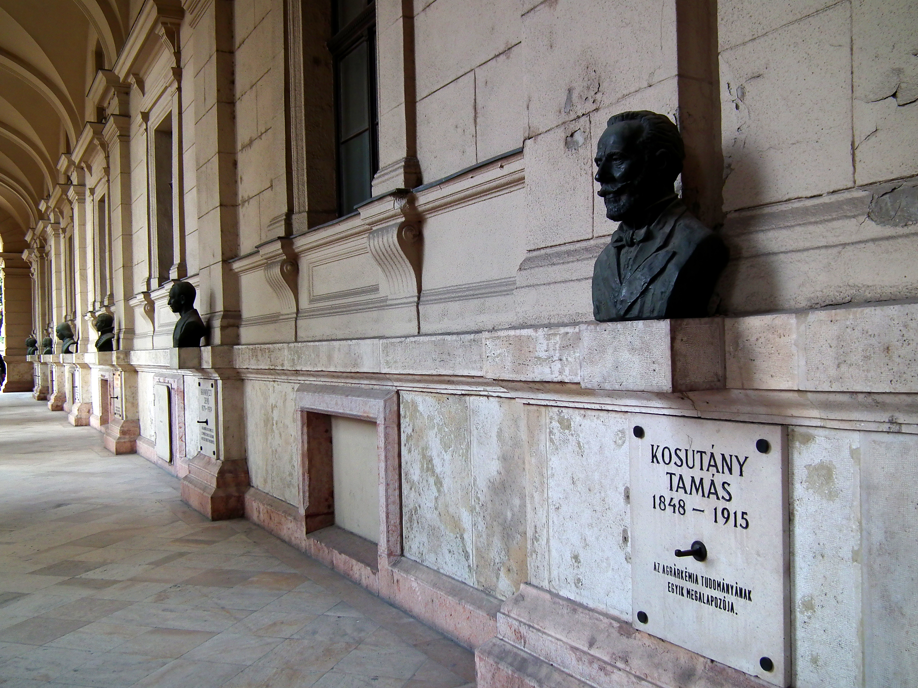 Földművelésügyi Minisztérium This is a photo of a monument in Hungary. Identifier: 510